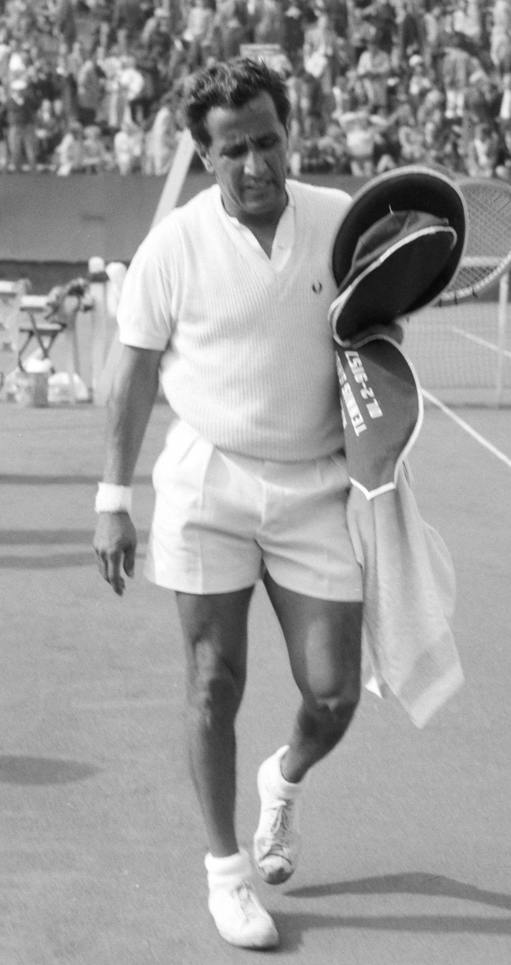 Tennis Noordwijk. Professional Championship. Segura en Gonzales. Segura na einde van de match.